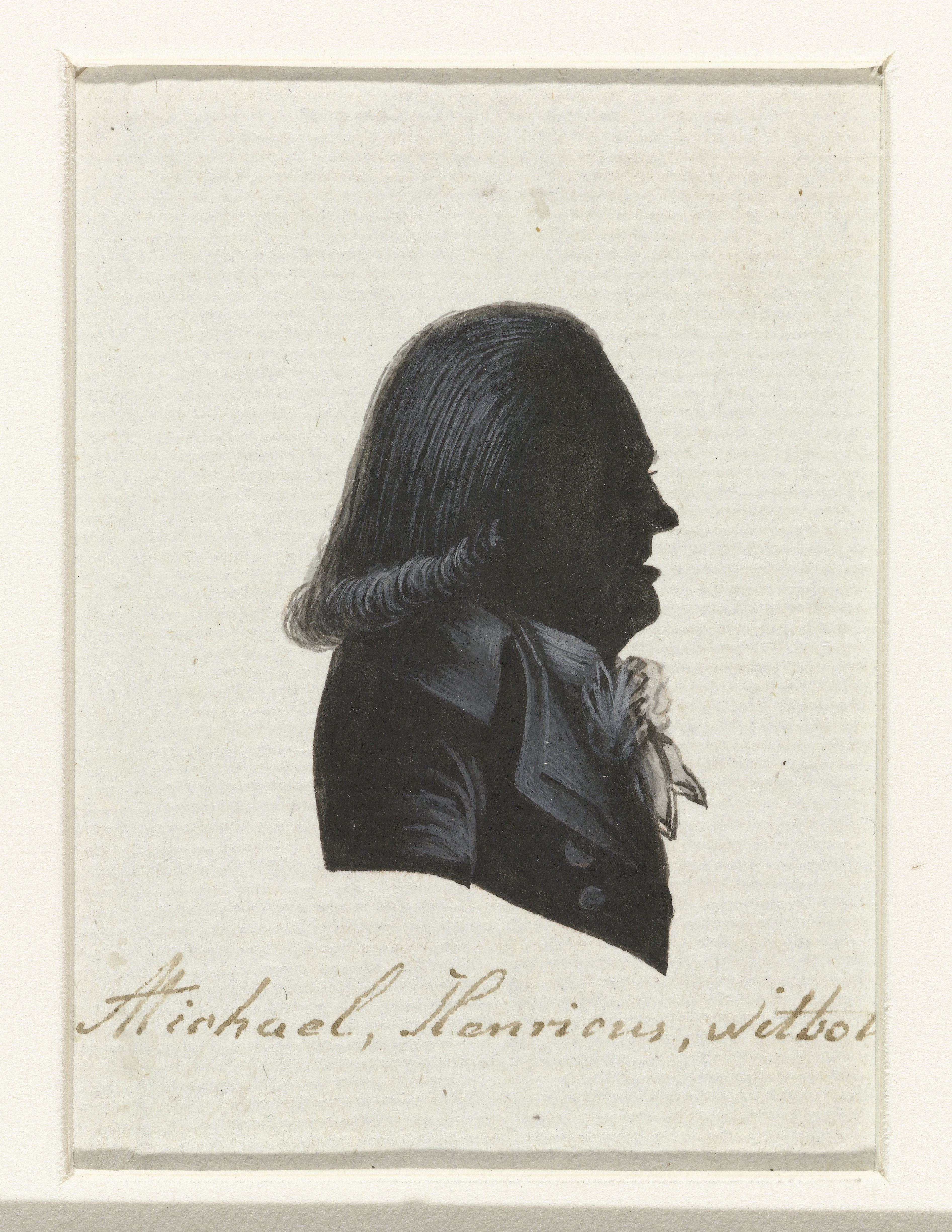 M.H. Witbols. Tekening in Oost-Indische inkt, waarschijnlijk gemaakt door Hausdorff. De tekening behoort tot een serie van portretten van afgevaardigden naar de Eerste Nationale Vergadering in 1796-1797. Van de serie werden gravures gemaakt die zijn afgedrukt in "Geschiedenis der staatsregeling, voor het Bataafsche volk", een boek van Cornelius Rogge (1799).